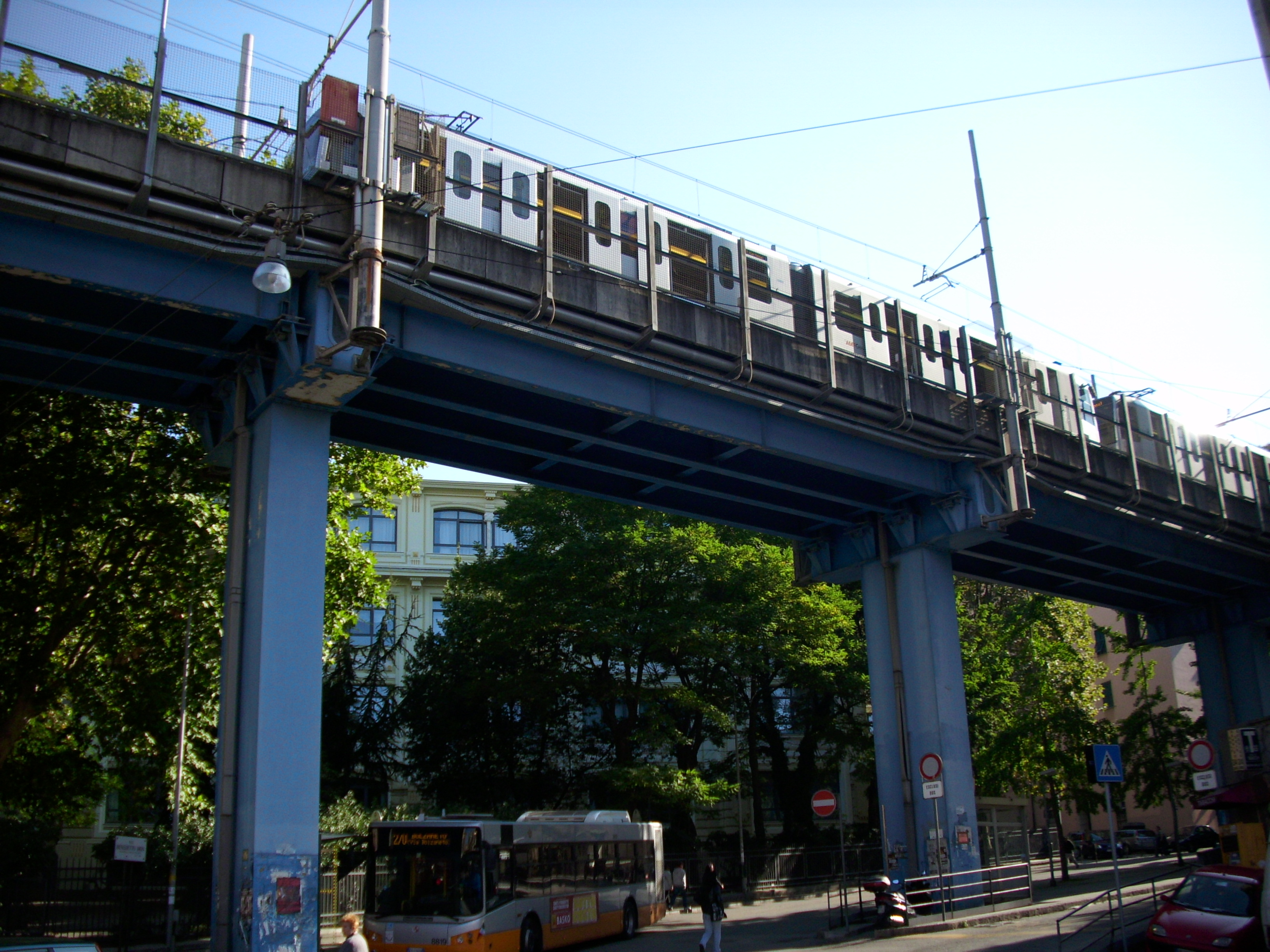 Stazione di Brin della Metropolitana di Genova